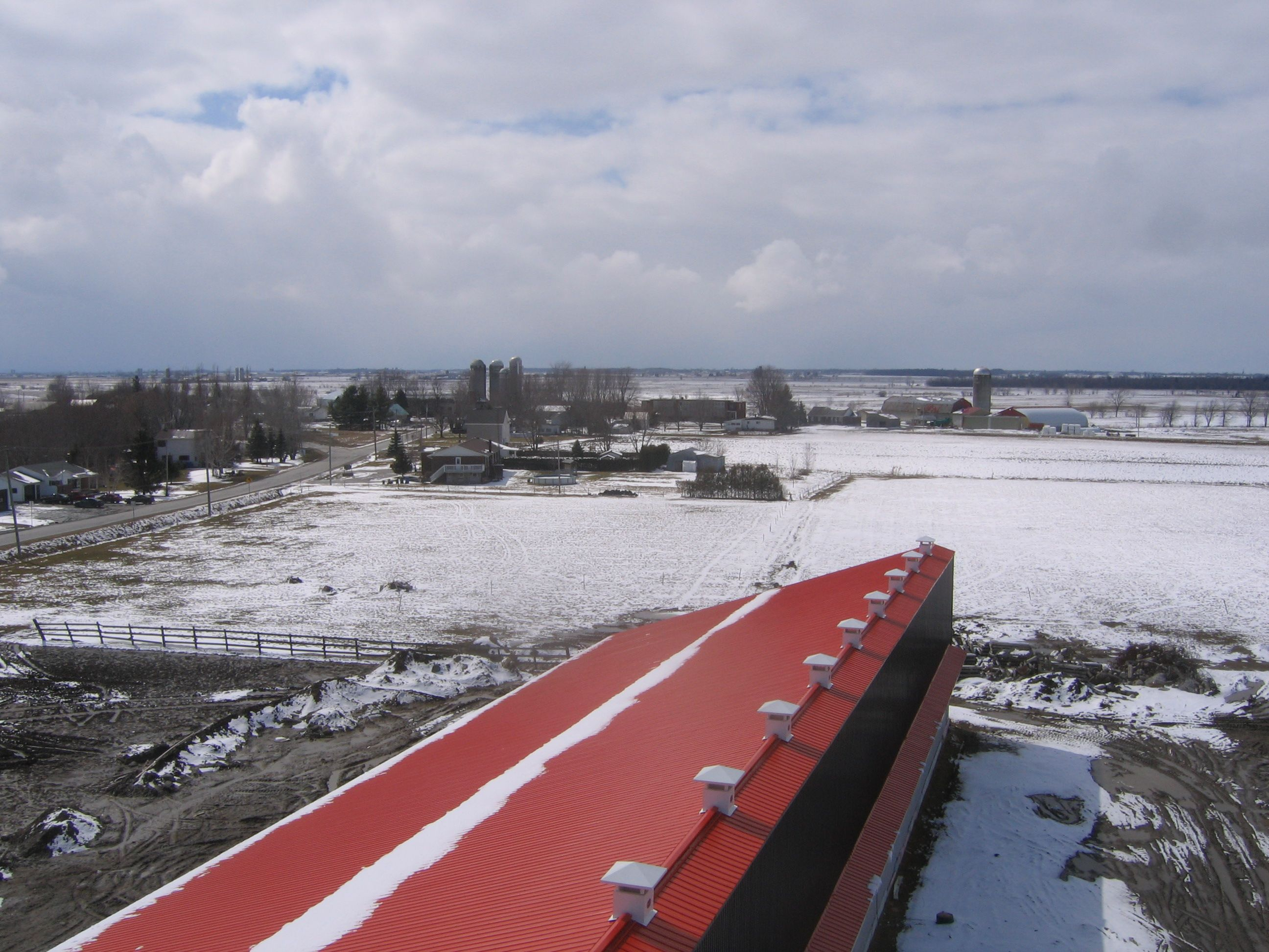 Sainte-Sabine vu du silo 18 m de la ferme Santschi